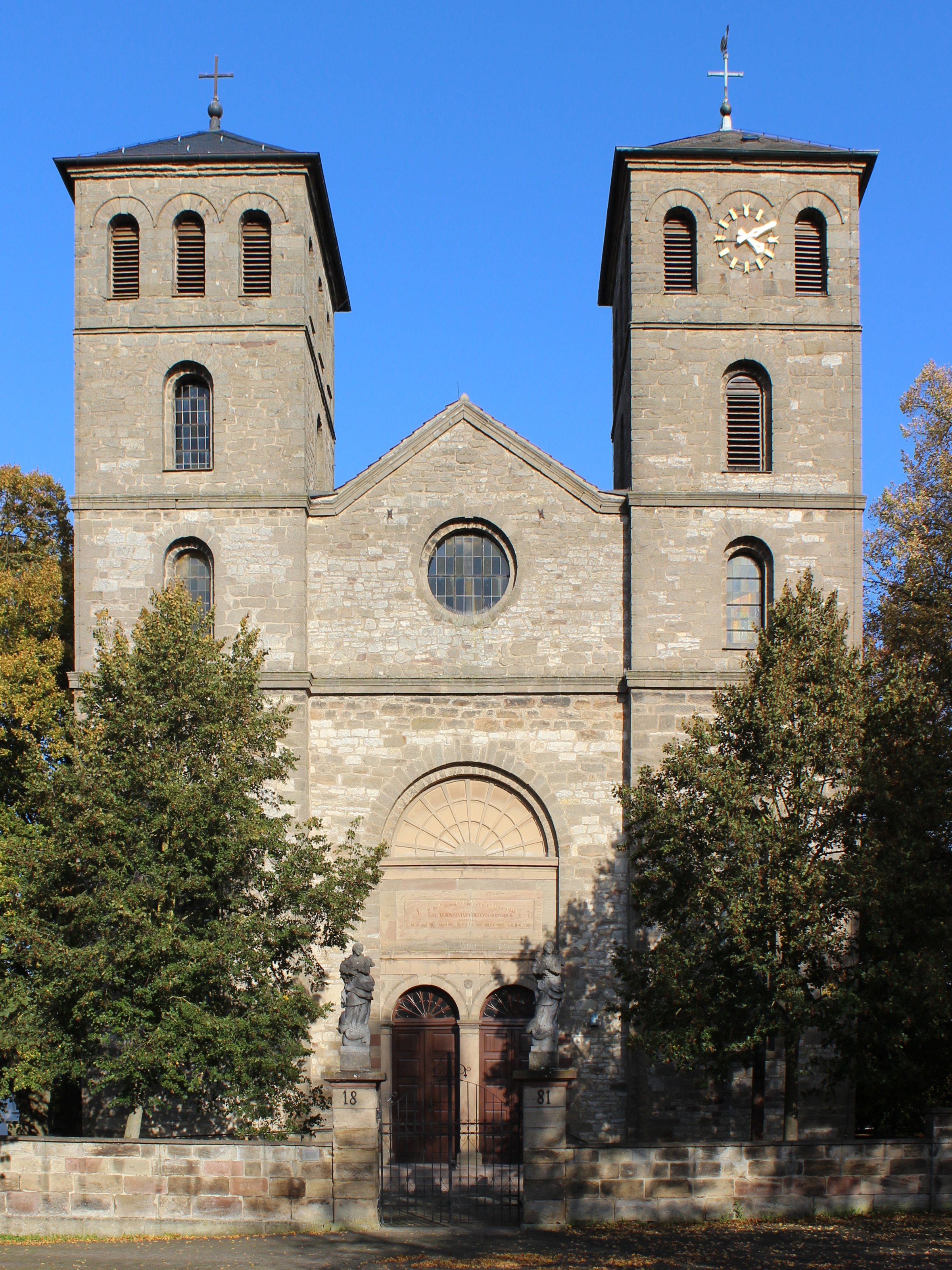 kath. Kirche St. Margaretha in Hohenwepel, Stadt Warburg, Ansicht von WestenThis is a photograph of an architectural monument. –900